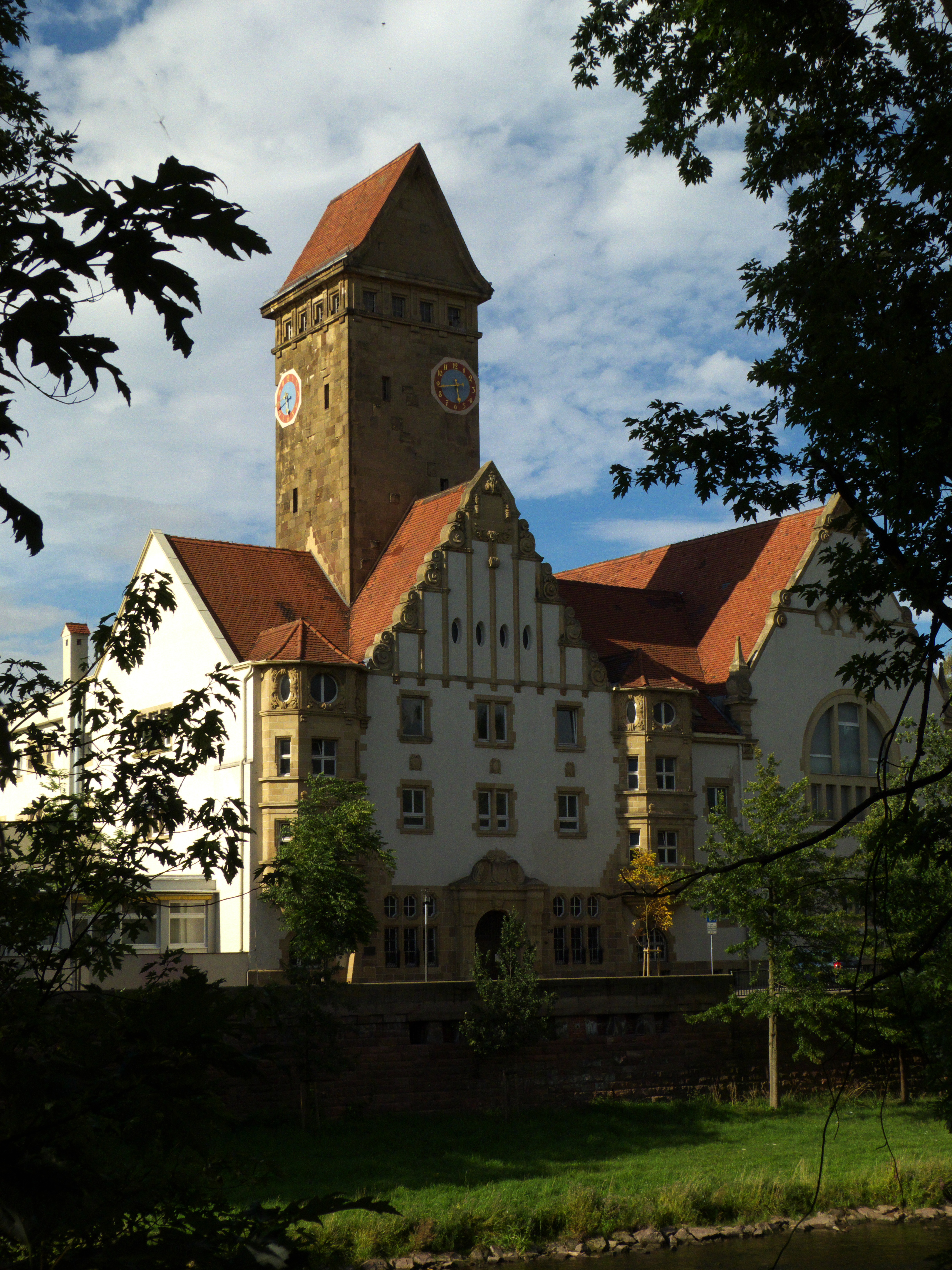 Emma-Jäger-Bad